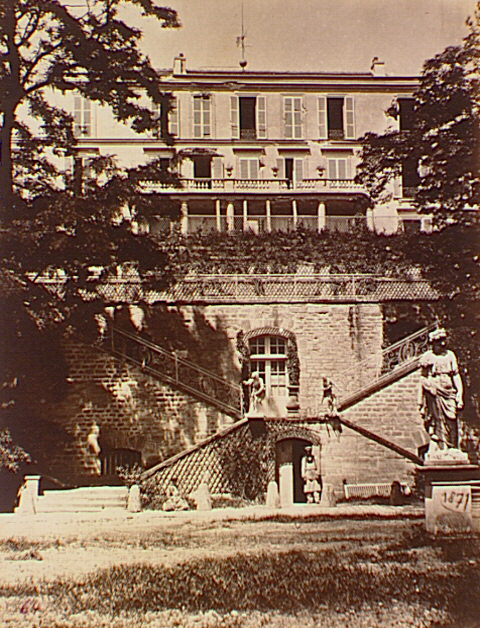 Les ruines de Paris et de ses environs, 1870-1871 / cent photographies par A. Liébert ; texte par Alfred d' Aunay. F. 58. Stains, Vue extérieure des ruines du Château (N°100)